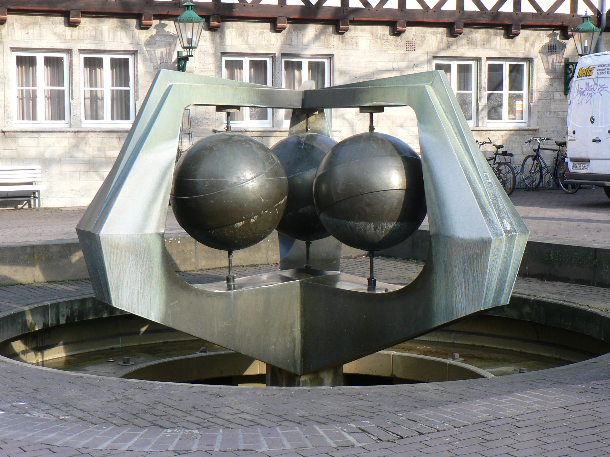 Brunnen im Ballhof, Hannover